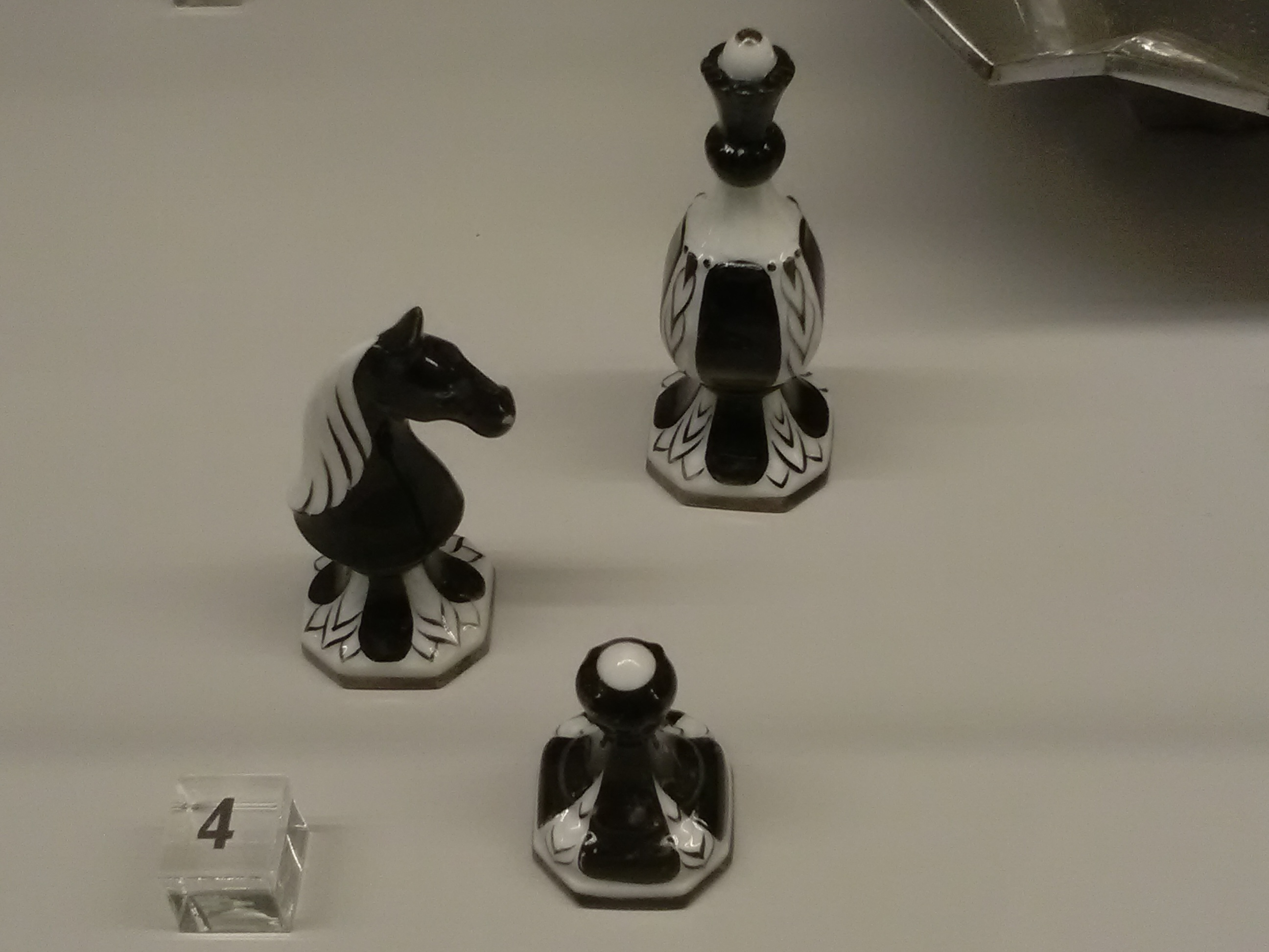 Figury i piony szachowe wytwórni porcelany w Ćmielowie lata 30 XX wieku Muzeum Sztuk Użytkowych w Poznaniu.